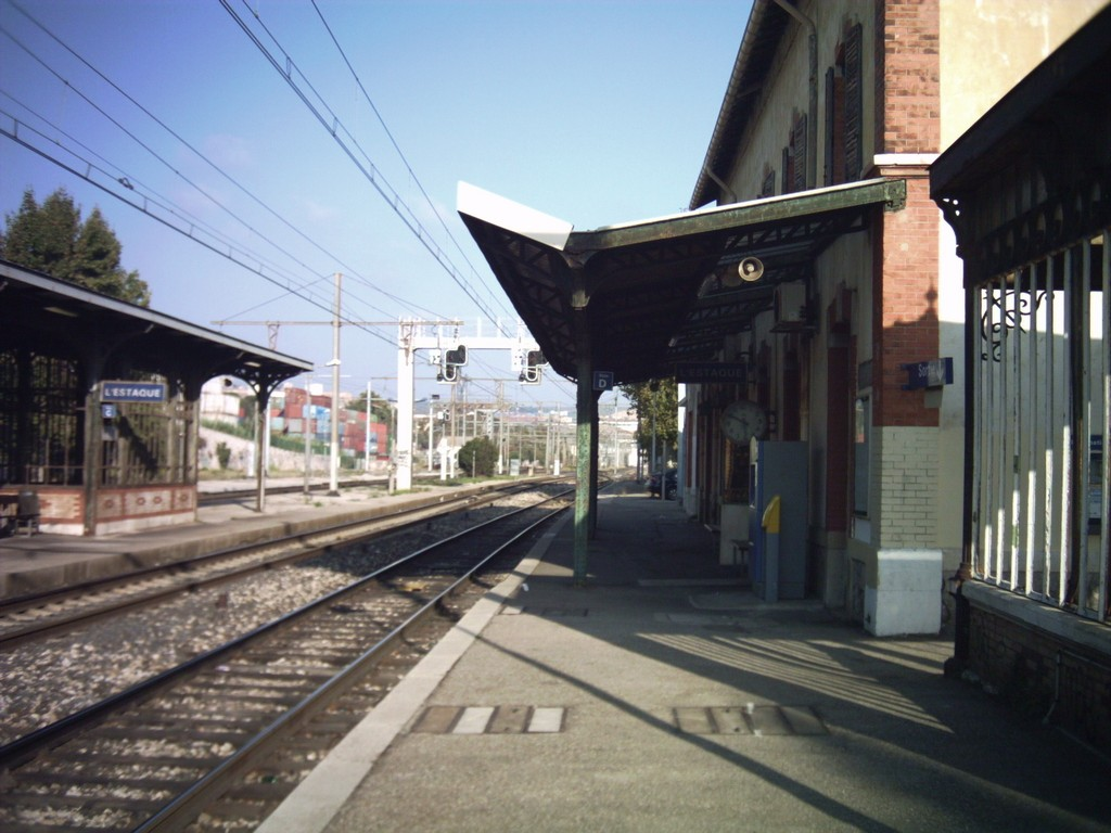 La gare de l'Estaque, vue prise en direction de Marseille-Saint-Charles. Au premier plan les deux voies paires, banalisées (cf. les signaux en arrière-plan) ; la voie vers la côte bleue est encore sous caténaire.